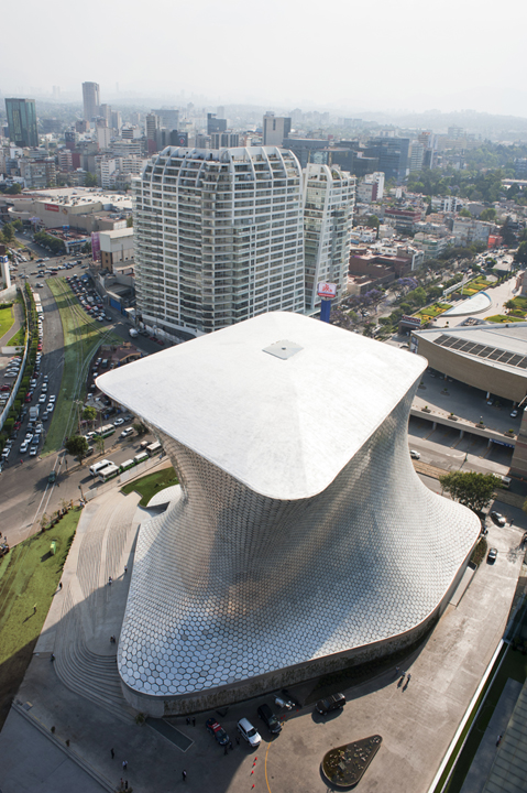 Museo Soumaya Plaza Carso y Nuevo Polanco — en Mexico City Credits FREE Fernando Romero EnterprisE photo by Adam Wiseman